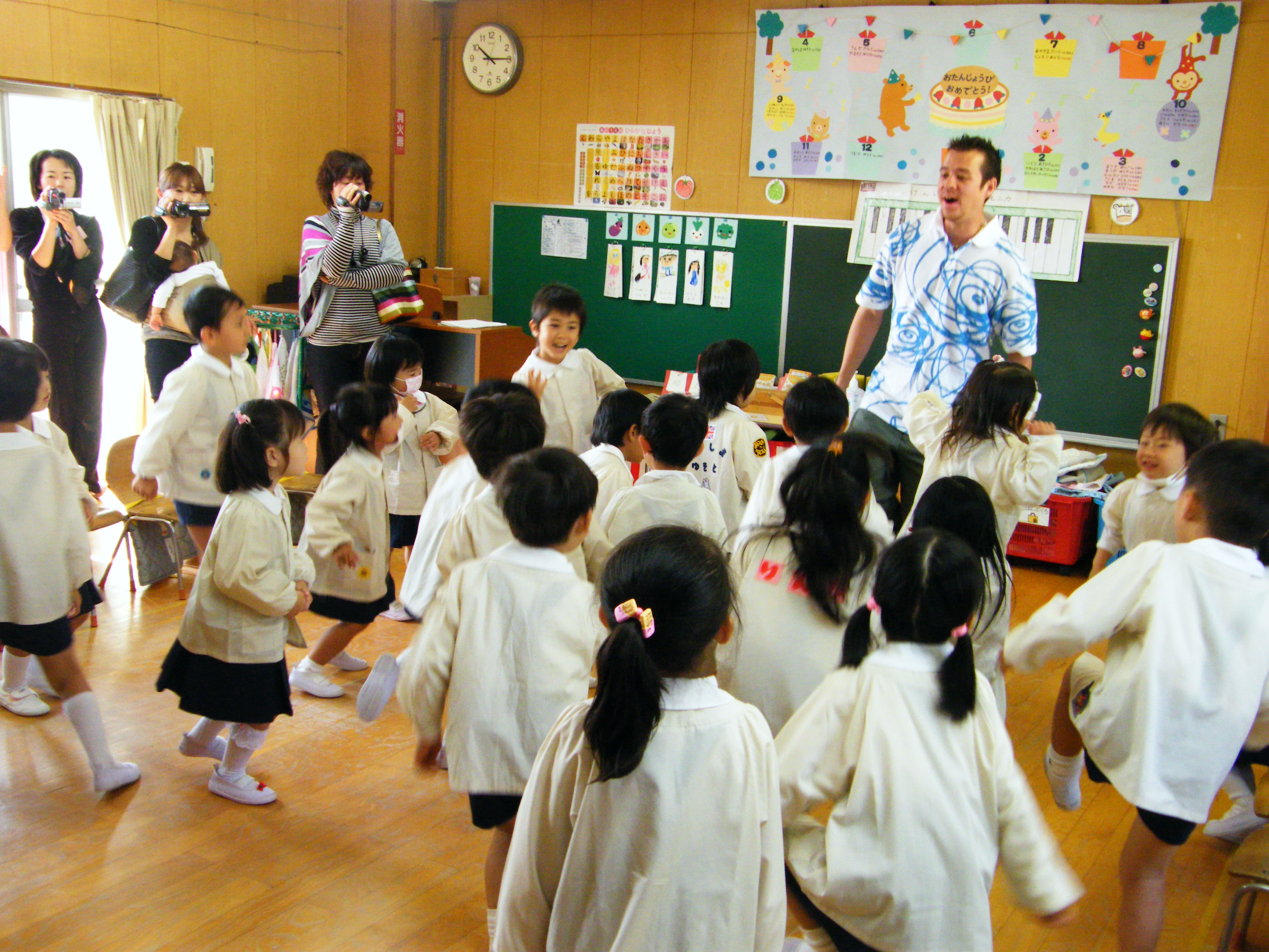 Parent's day at Eirfan's Kindergarten